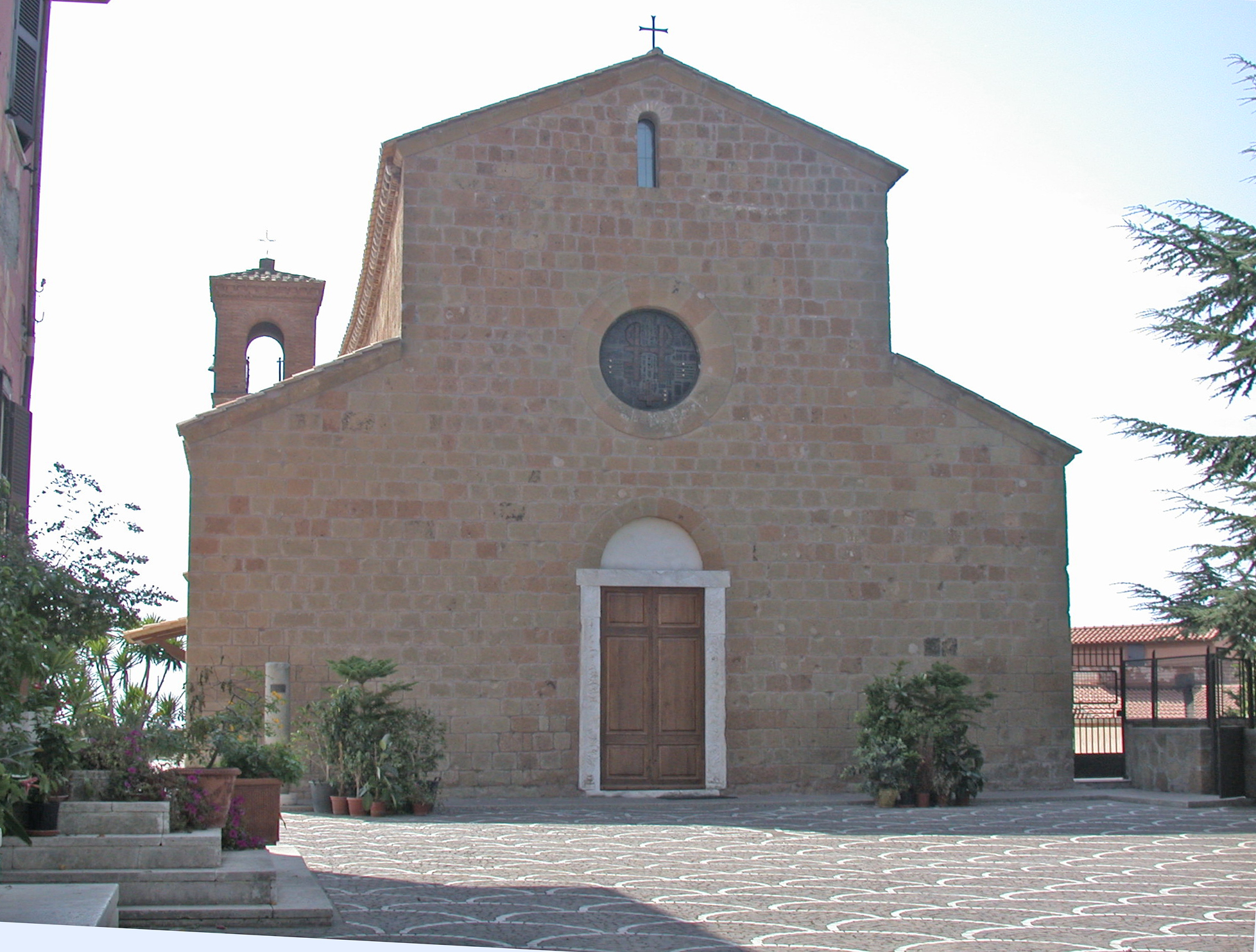 Italia, Lazio, provincia di Roma, Ardea: facciata della chiesa di San Pietro Apostolo